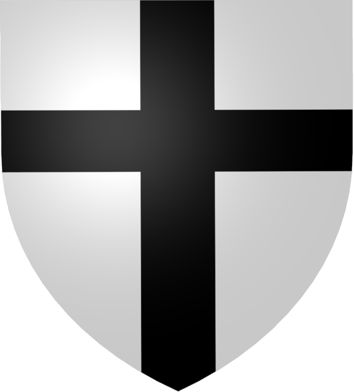 Teuton